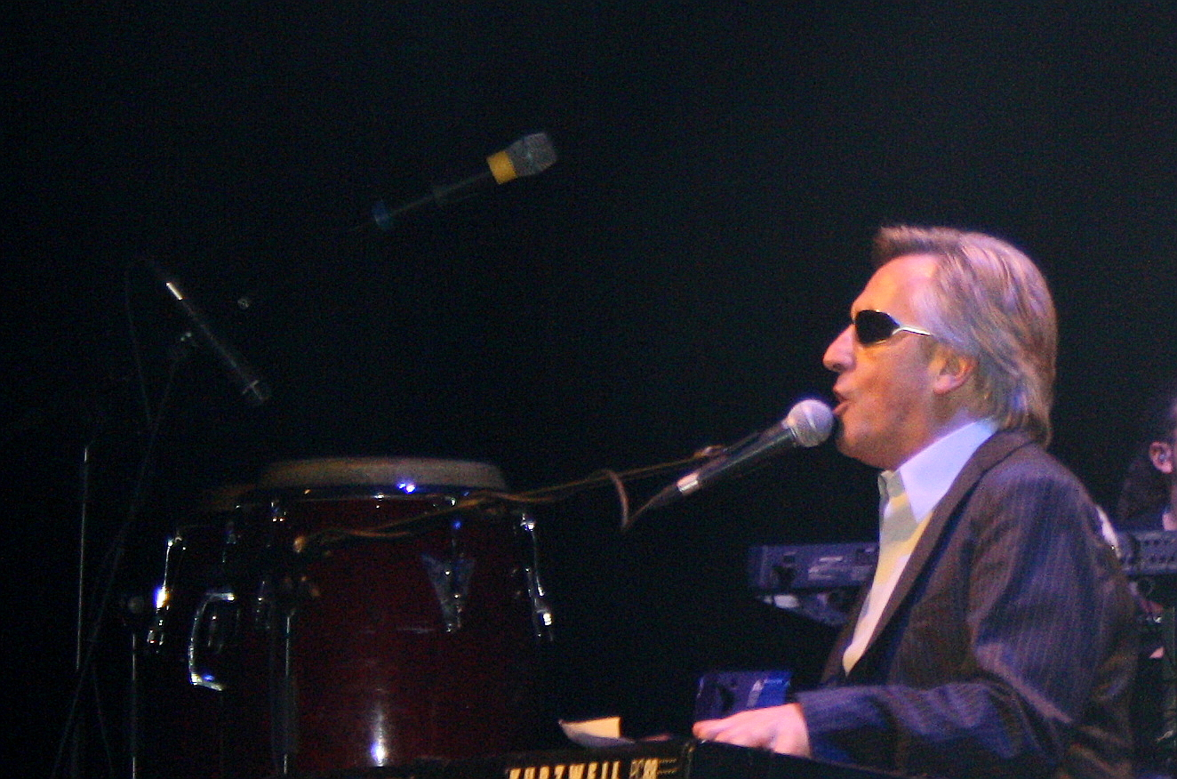 Photo prise de Gilbert Montagné lors d'un concert à Genève en Novemmbre 2006